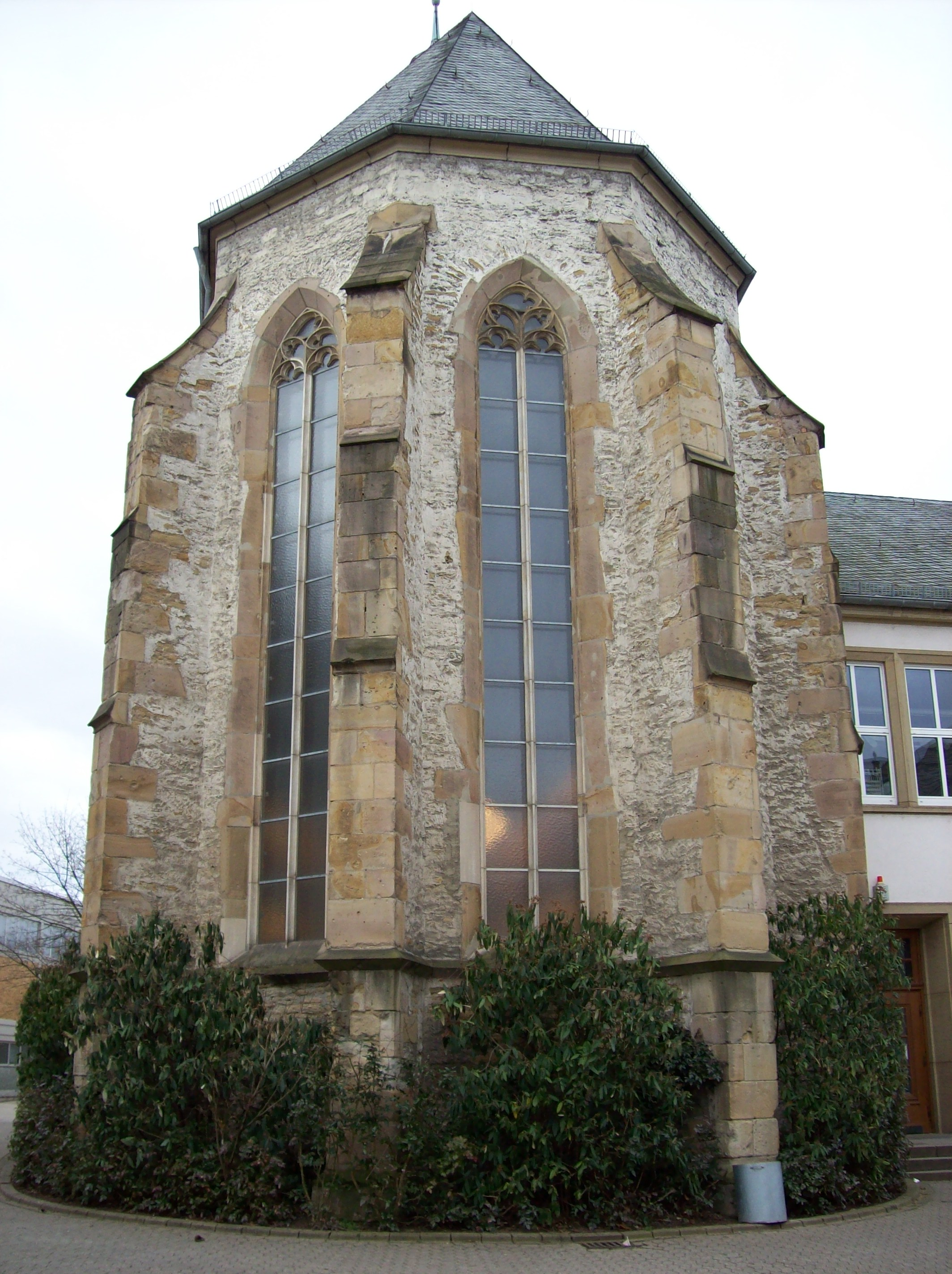 Chor des ehemaligen Franziskanerklosters St. Wolfgang in Bad Kreuznach, jetzt Teil des Gymnasiums an der Stadtmauer